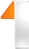 Logo kanálu Jednotka (2004-2012).